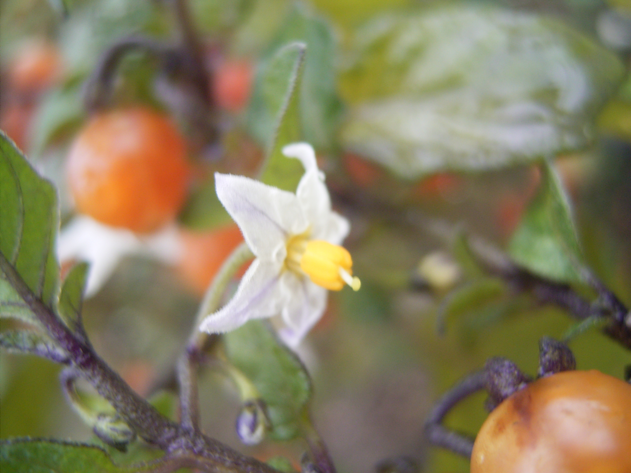 Deze foto toont een bloem van de Driebloemige nachtschade. Ik nam de foto op 1 oktober 2005 in arboretum De Dreijen in Wageningen. This photo shows a flower of Solanum triflorum. I took the photo in arboretum De Dreijen. Misidentified, not Solanum triflorum!